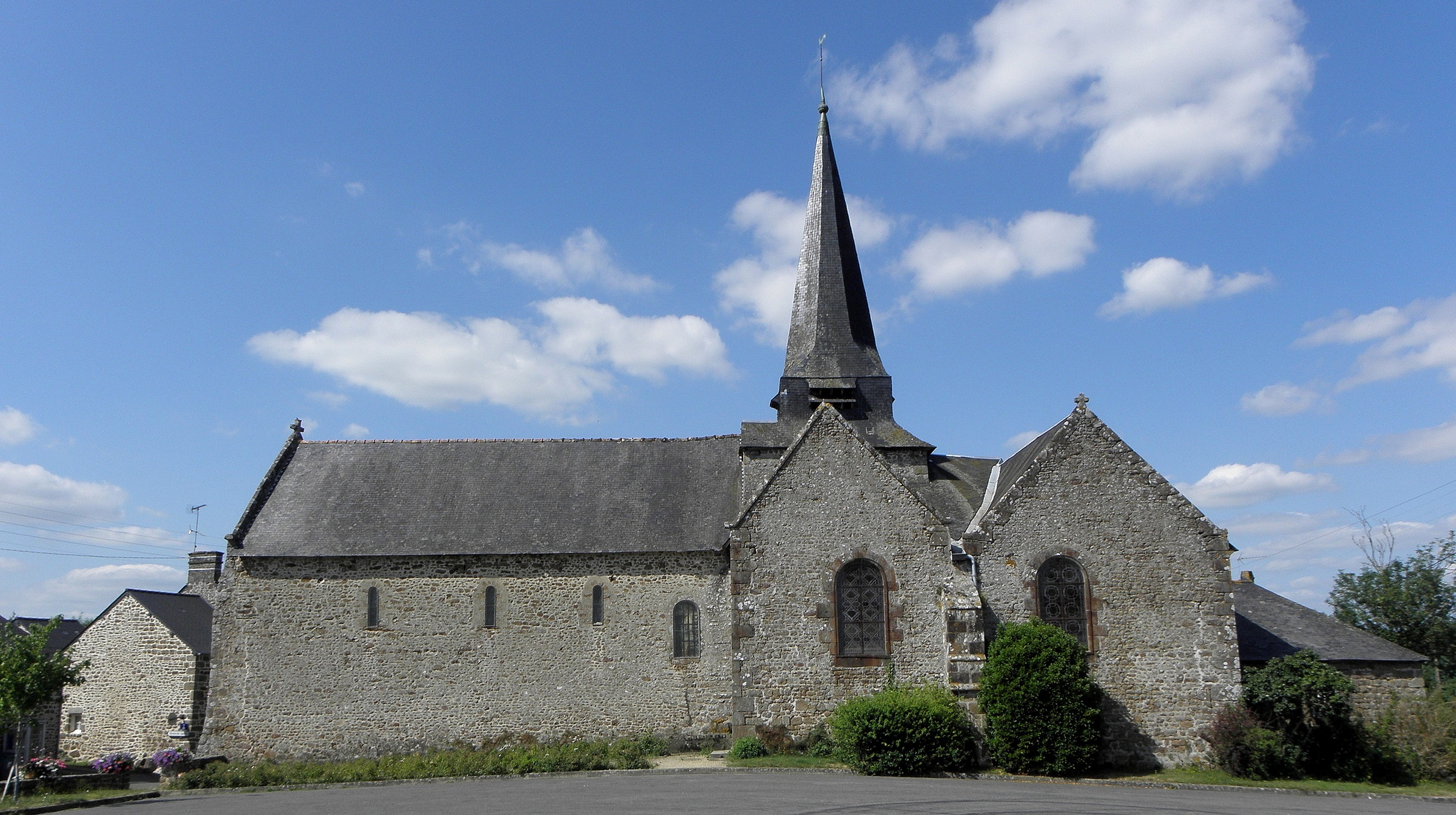 Église Saint-Martin de Cigné, commune d'Ambrières-les-Vallées (53).